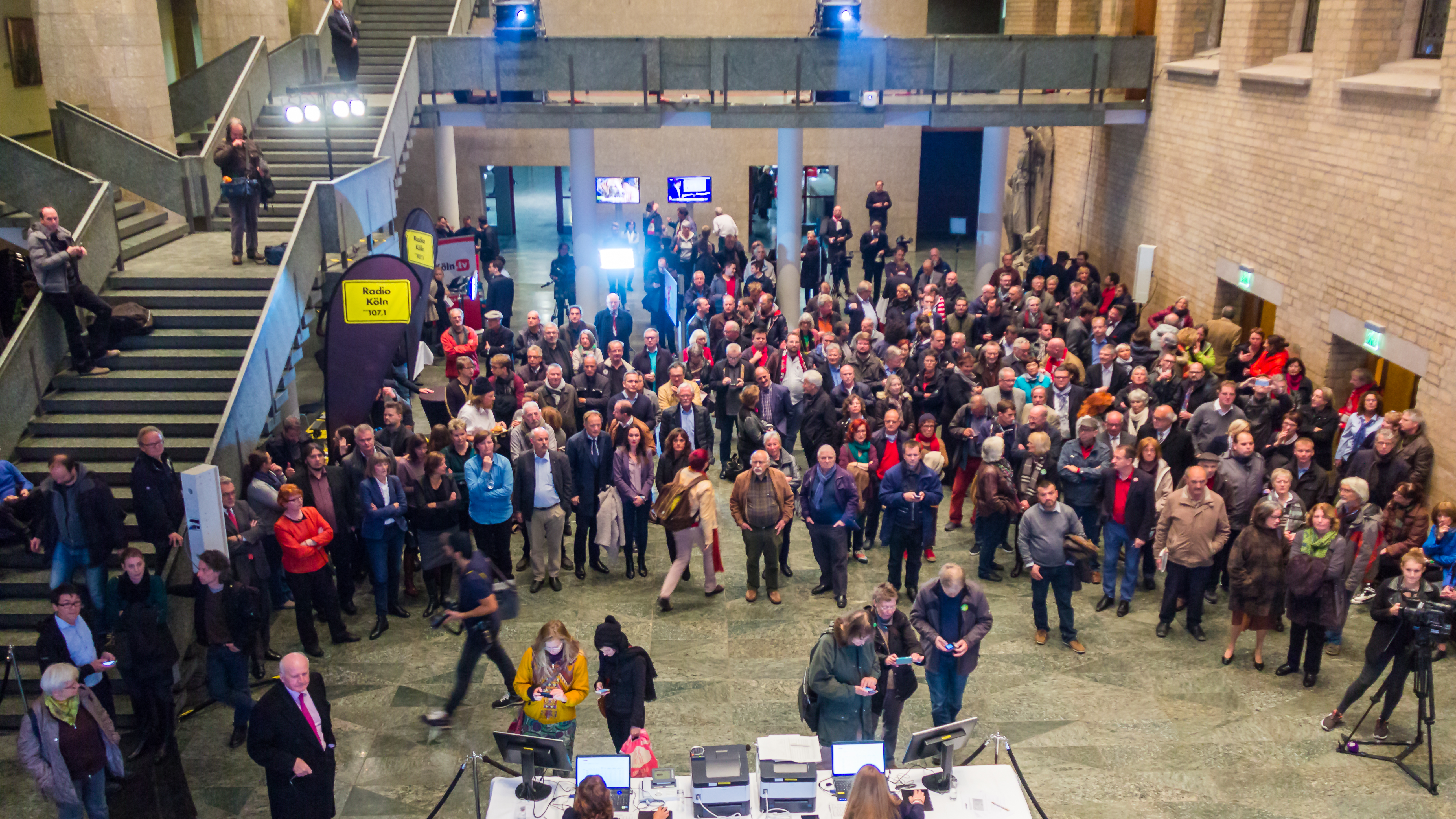 OB-Wahl Köln 2015, Wahlabend in der Piazetta des Historischen Rathauses von Köln Foto: Blick in die Piazetta